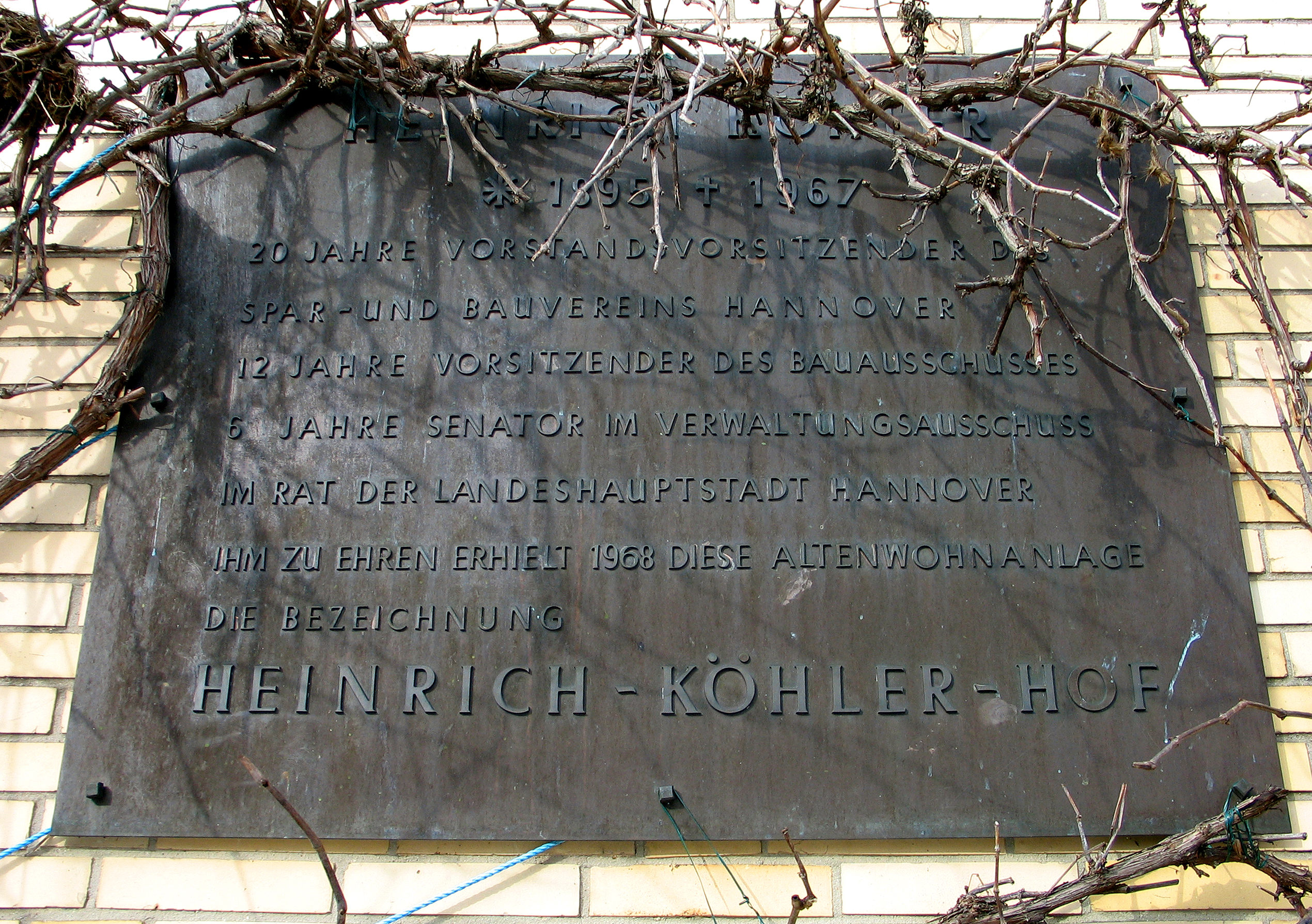 Eine Tafel im Heinrich-Köhler-Hof in Hannover-Hainholz informiert: „Heinrich Köhler (1895-1967), 20 Jahre Vorstandsvorsitzender des Spar- und Bauvereins Hannover, 12 Jahre Vorsitzender des Bauausschusses, 5 Jahre Senator im Verwaltungsausschuss im Rat der Landeshauptstadt Hannover. Ihm zu Ehren erhielt 1968 diese Altenwohnanlage die Bezeichnung Heinrich-Köhler-Hof.“ ...